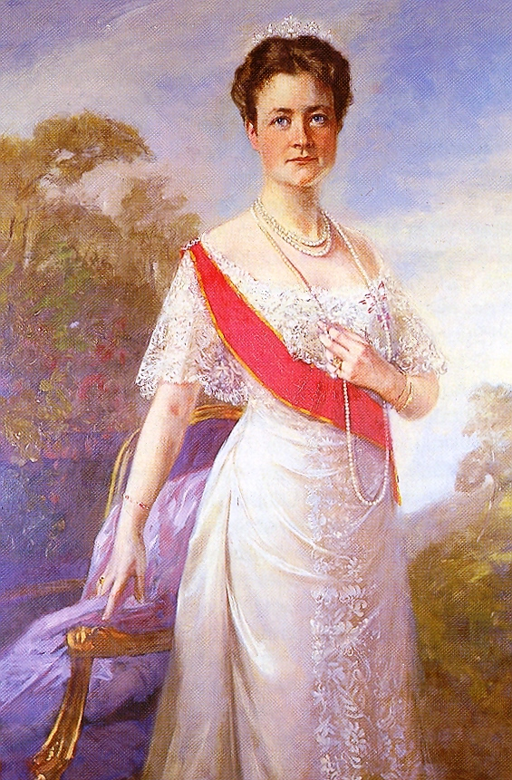 Bertha von Hessen-Philippsthal (1871-1919), erste Frau von Leopold IV von Lippe